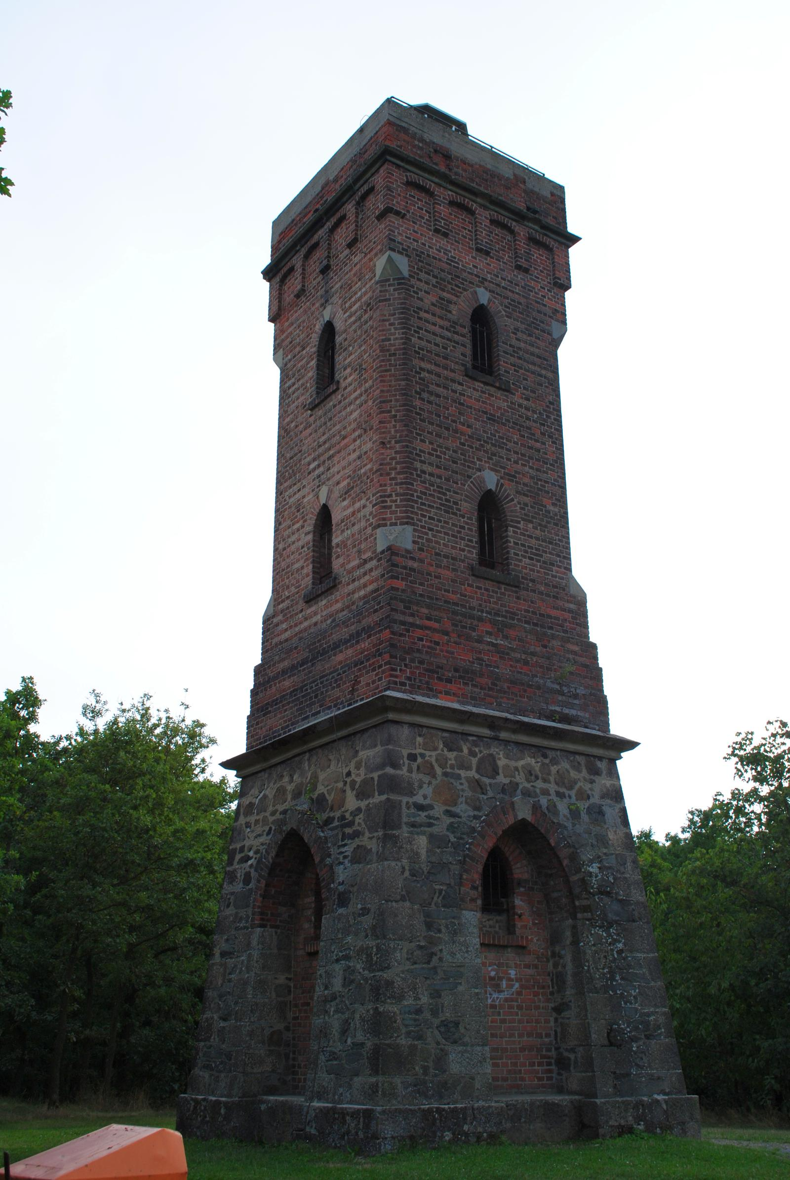 Mosenturm auf dem Eisenberg an der Talsperre Pöhl in der Nähe der Sperrmauer